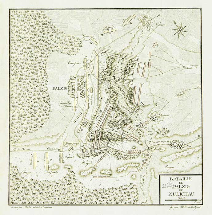 Битва при Пальциге (Кае)